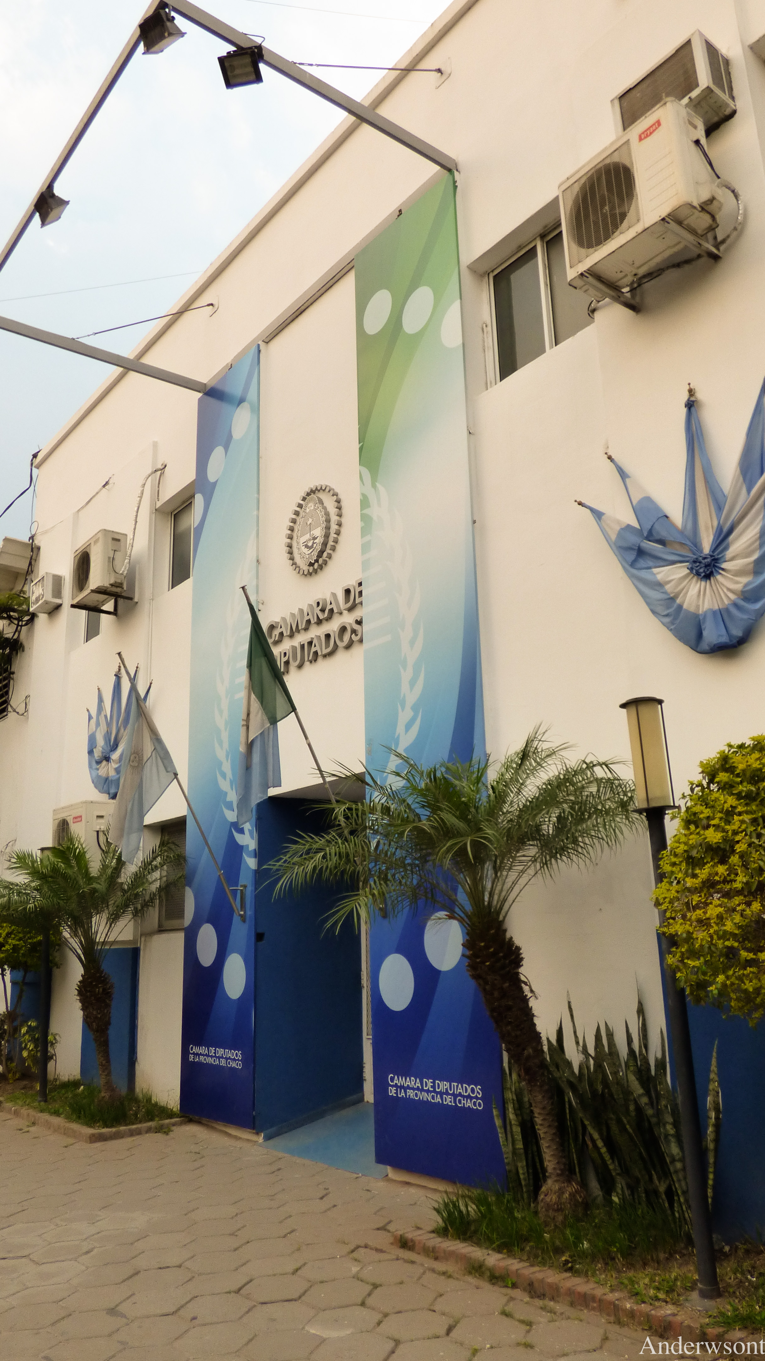 Frente de Camara de Diputados Chaco desde Vereda